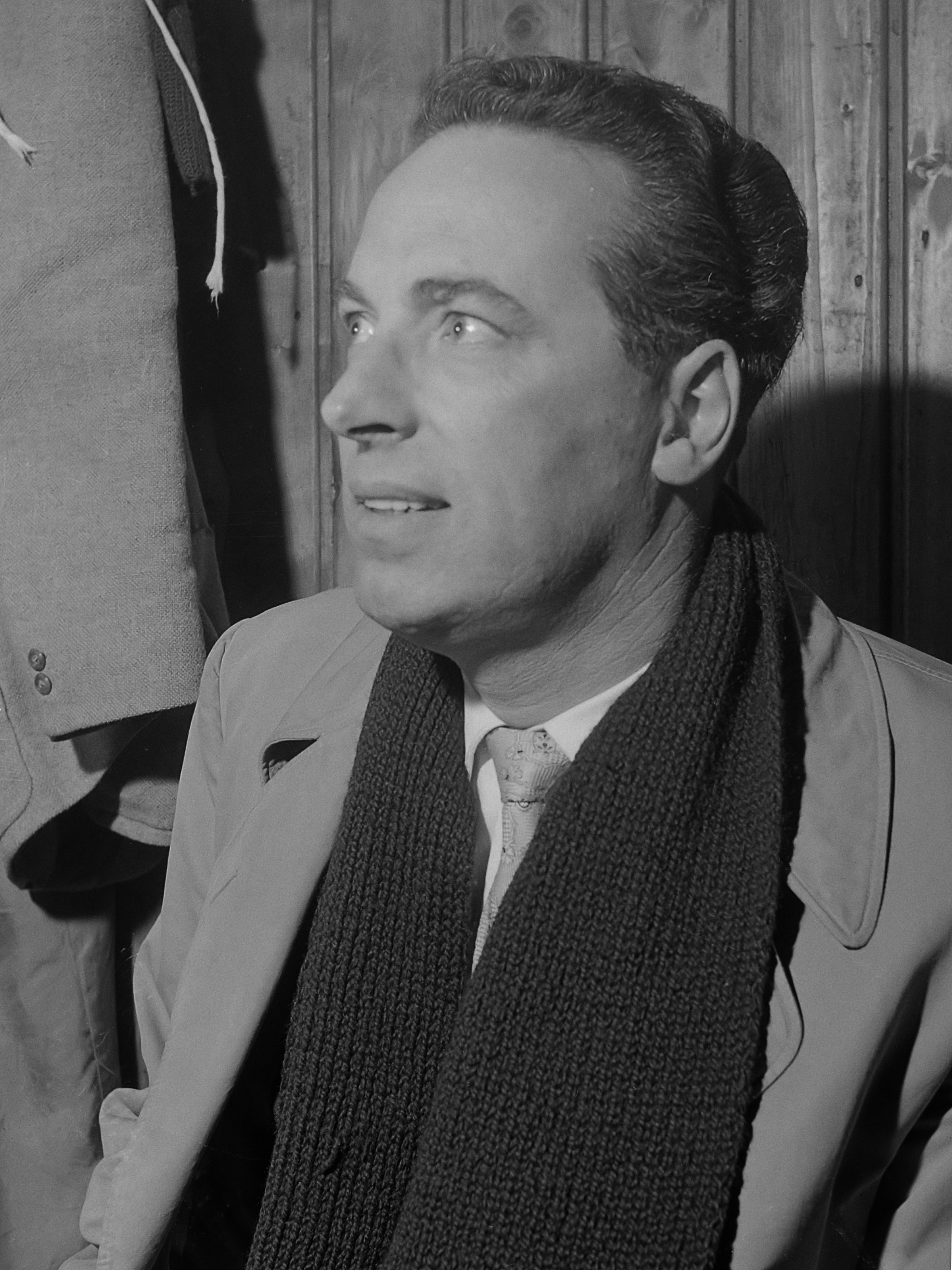 Voetbal. AVRO tegen Club van 100 . Kop Cees de Lange 10 april 1957